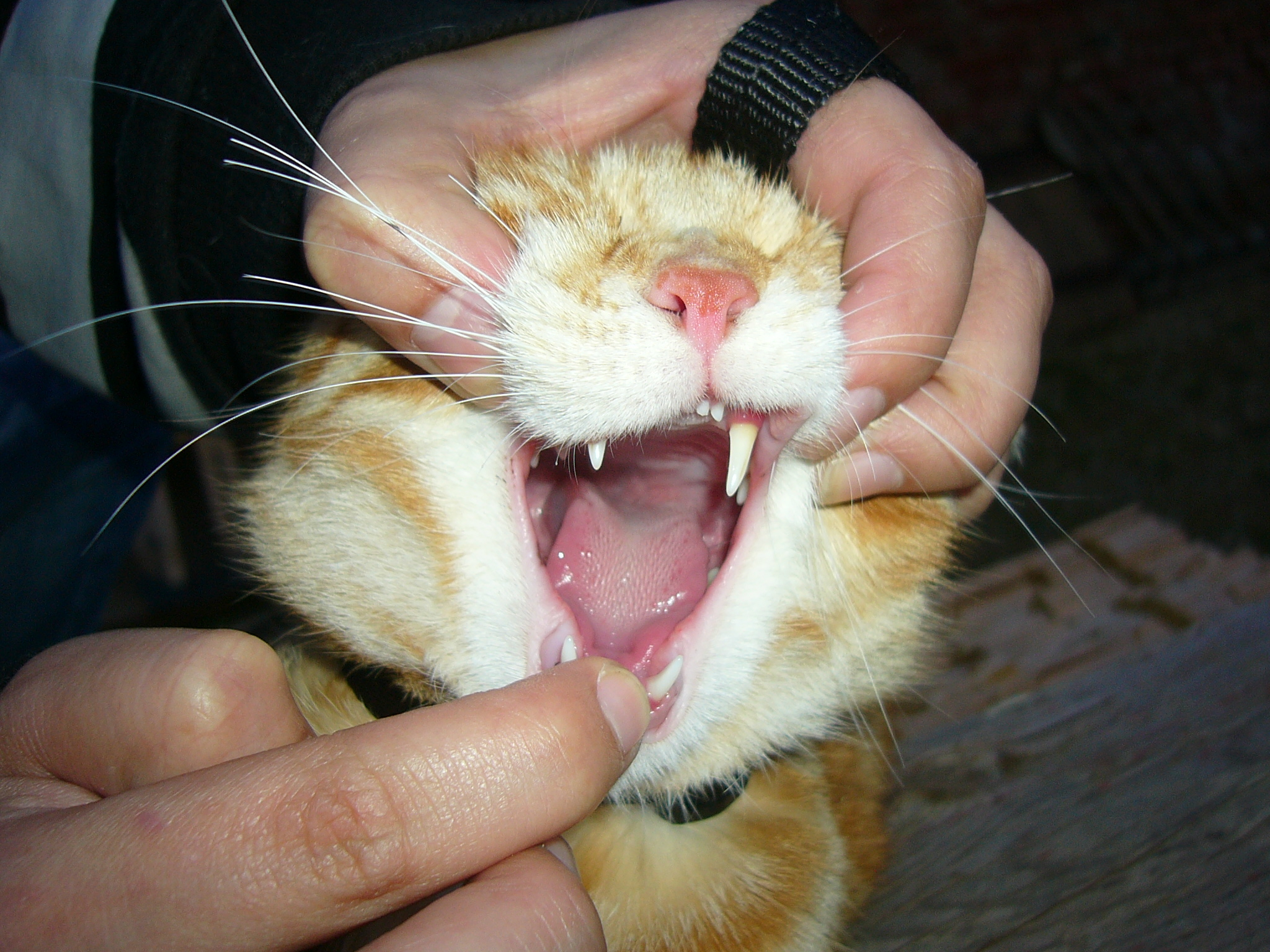 Katzenzähne